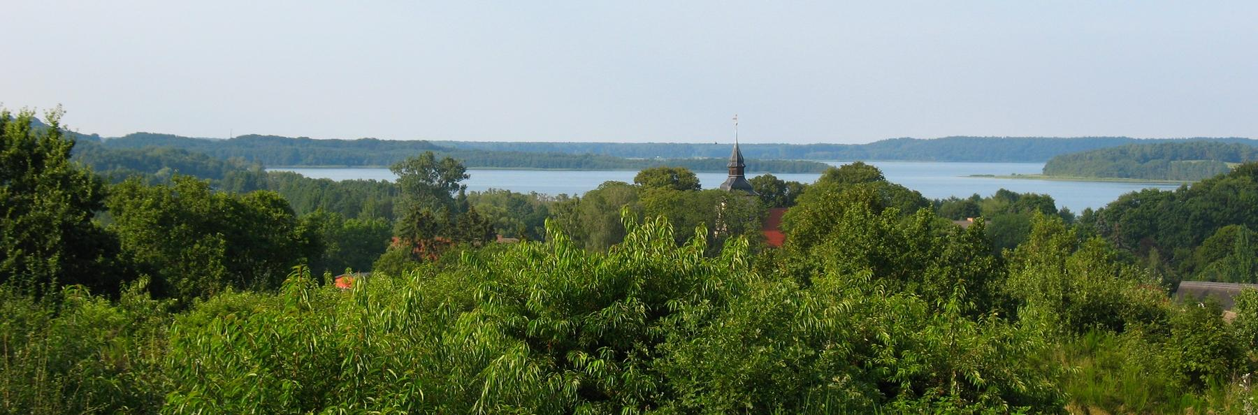 Benz: Blick von der Windmühle über den Ort in Richtung Norden